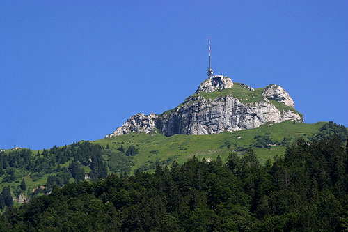 Hoher Kasten (1795 m.ü.M.) ob Brülisau